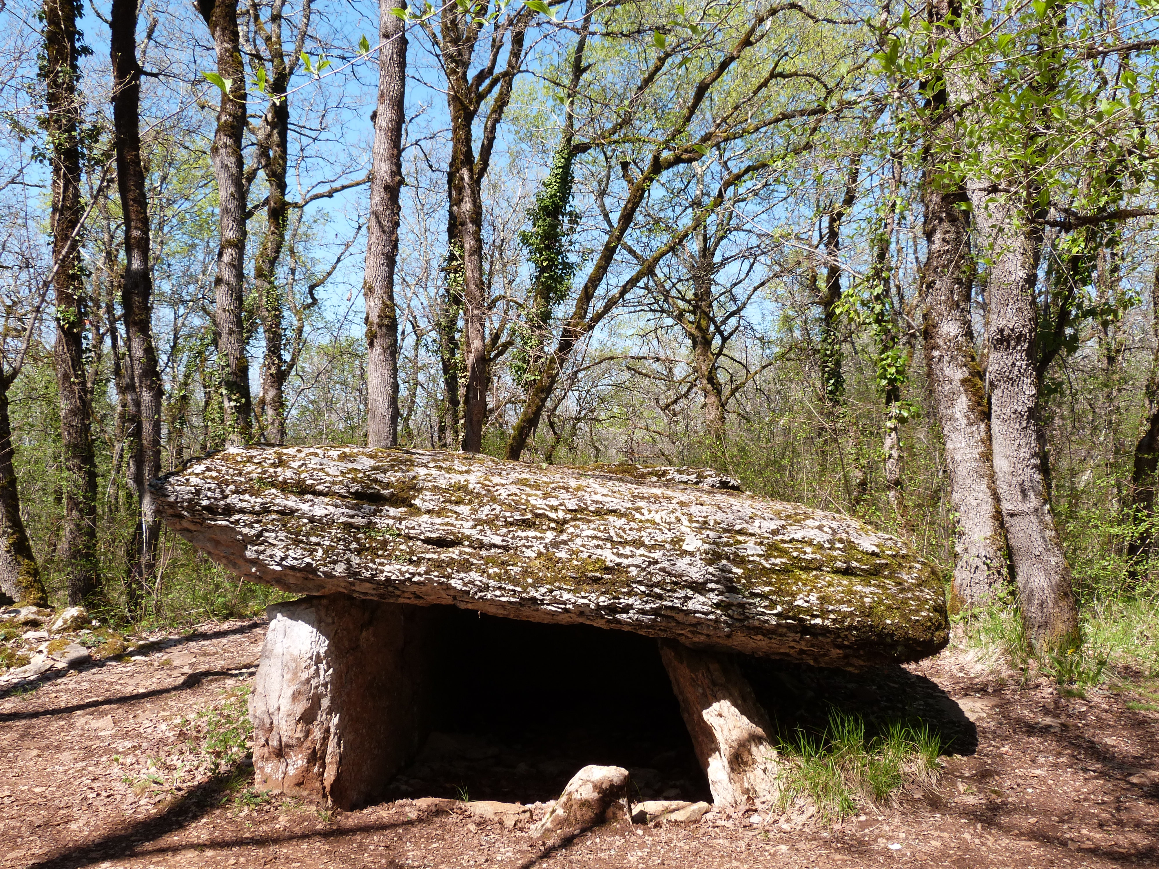 Dolmen du Bois del Rey avec, peut-être, sa pierre de blocage de la porte d'entrée